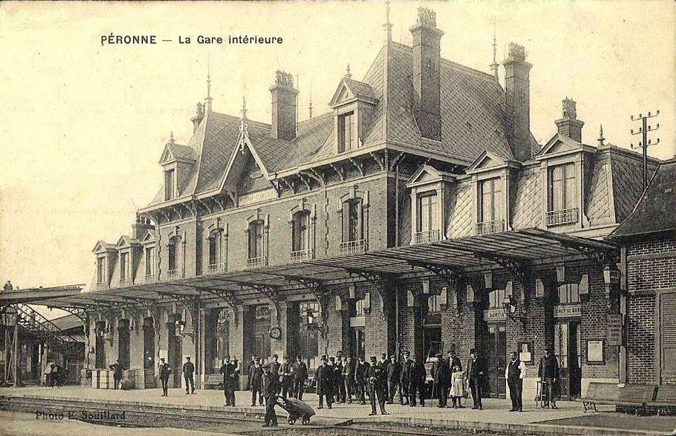 Le nouveau bâtiment-voyageurs peu après sa mise en service.